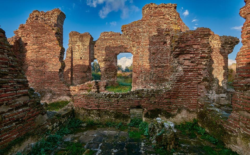 Terme Romane presso Acconia di Curinga